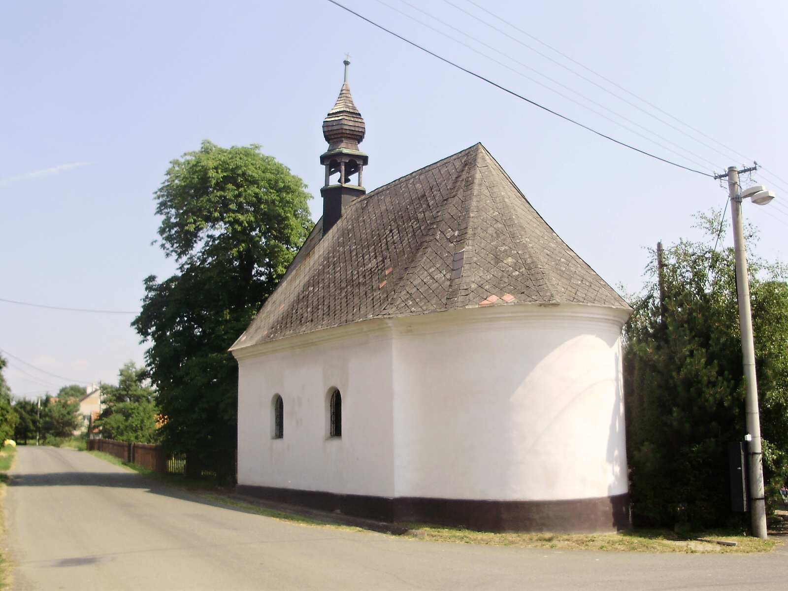 Kaple sv. Trojice - Kletné (Suchdol nad Odrou)